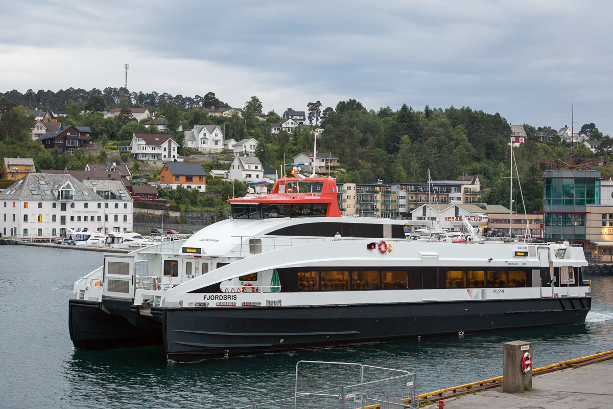 MS Fjordbris forlater Leirvik havn på vei til Skånevik i Sunnhordlandsruten.